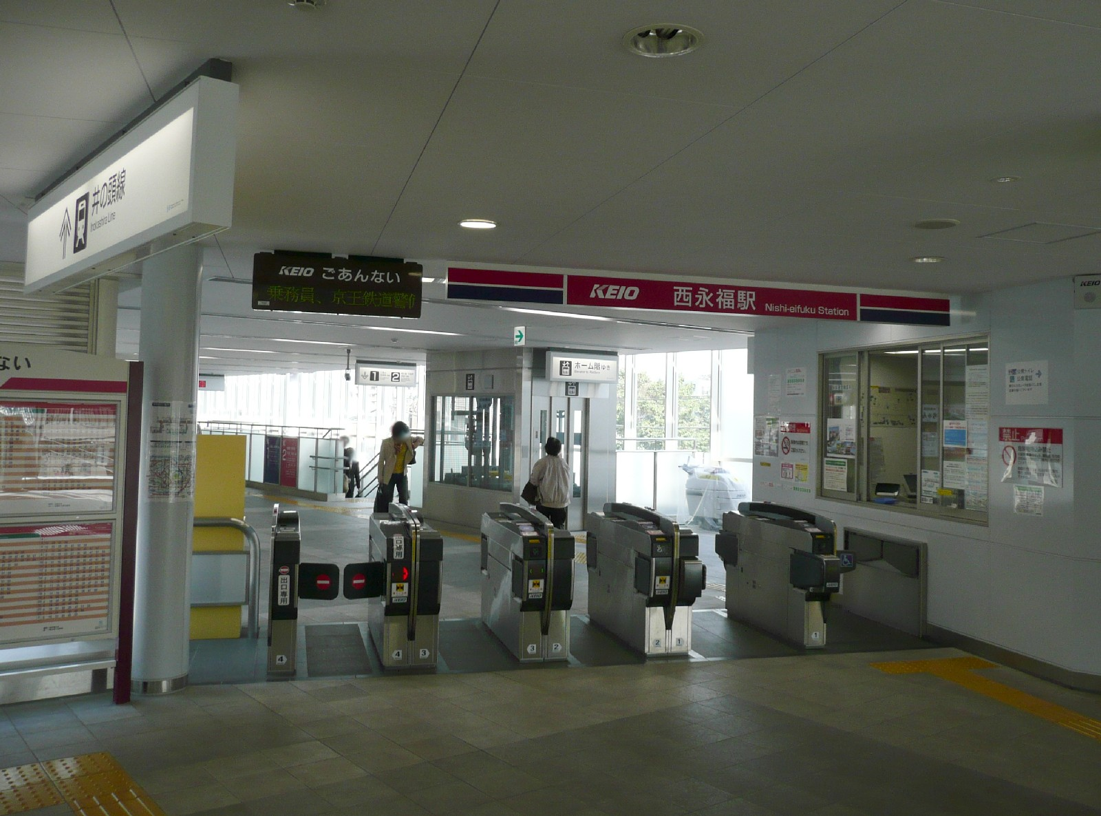 西永福駅改札口